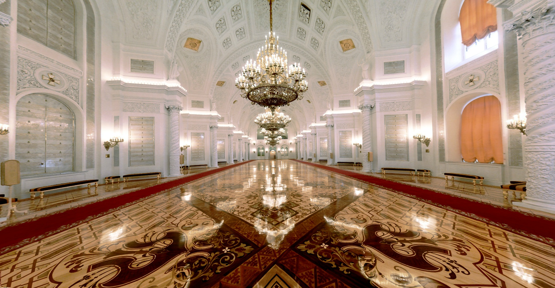 Георгиевский зал Большого Кремлёвского дворца Московского Кремля